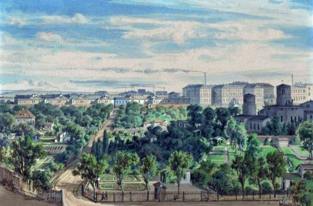 Das Johannistal in Leipzig 1863 von Osten gesehen, rechts die neue Sternwarte.(Aquarell über Bleistift)